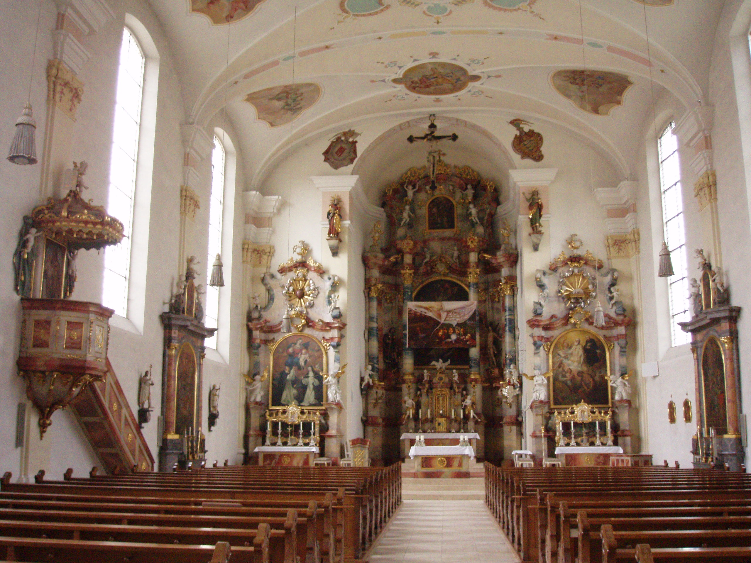 Pfarrkirche St. Martin in Langenargen